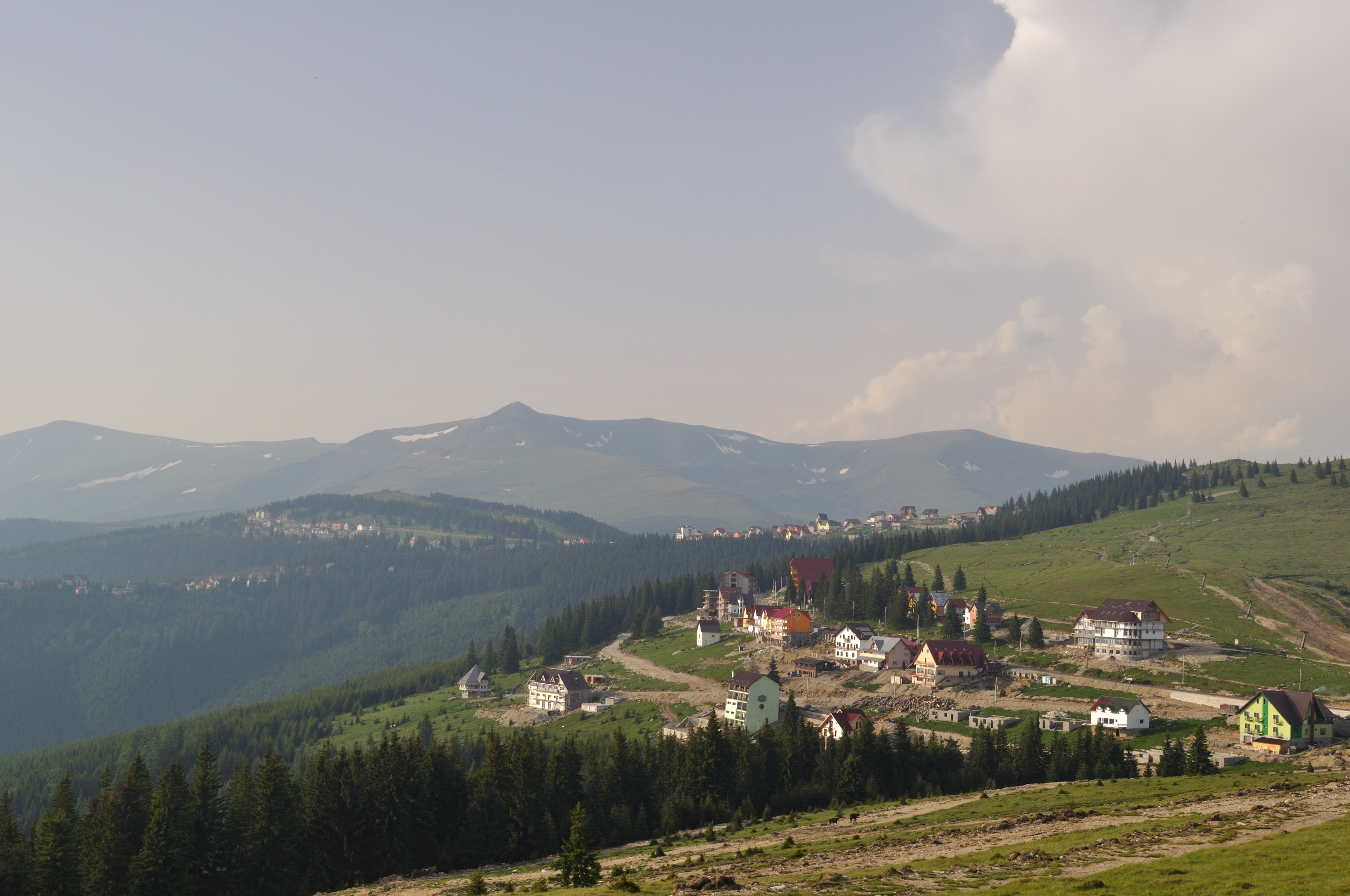 stațiunea Rânca văzută de pe șoseaua Transalpina